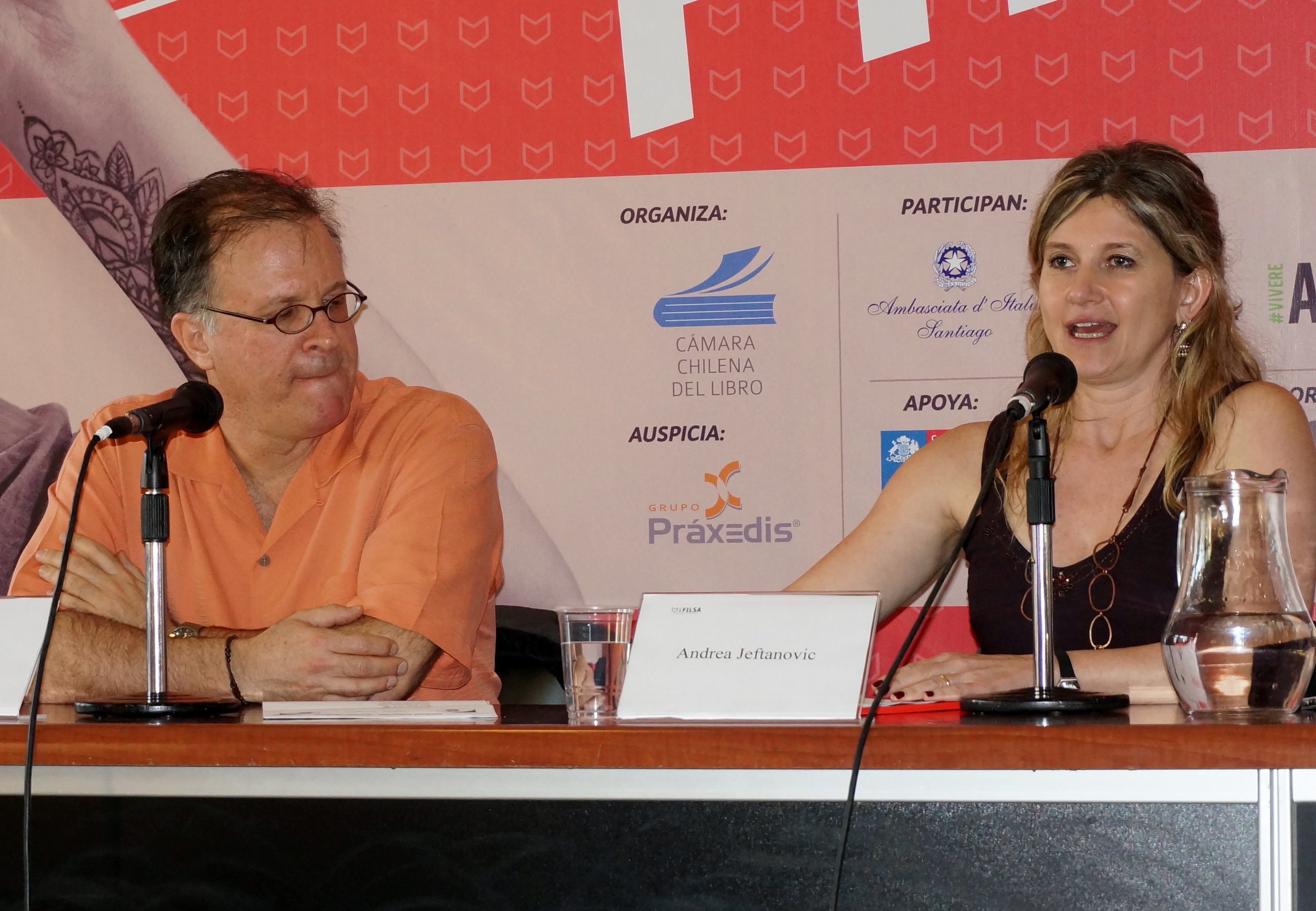 El lexicógrafo y escritor estadounidense Ilan Stavans con la chilena Andrea Jeftanovic en la Feria Internacional del Libro de Santiago 2017.